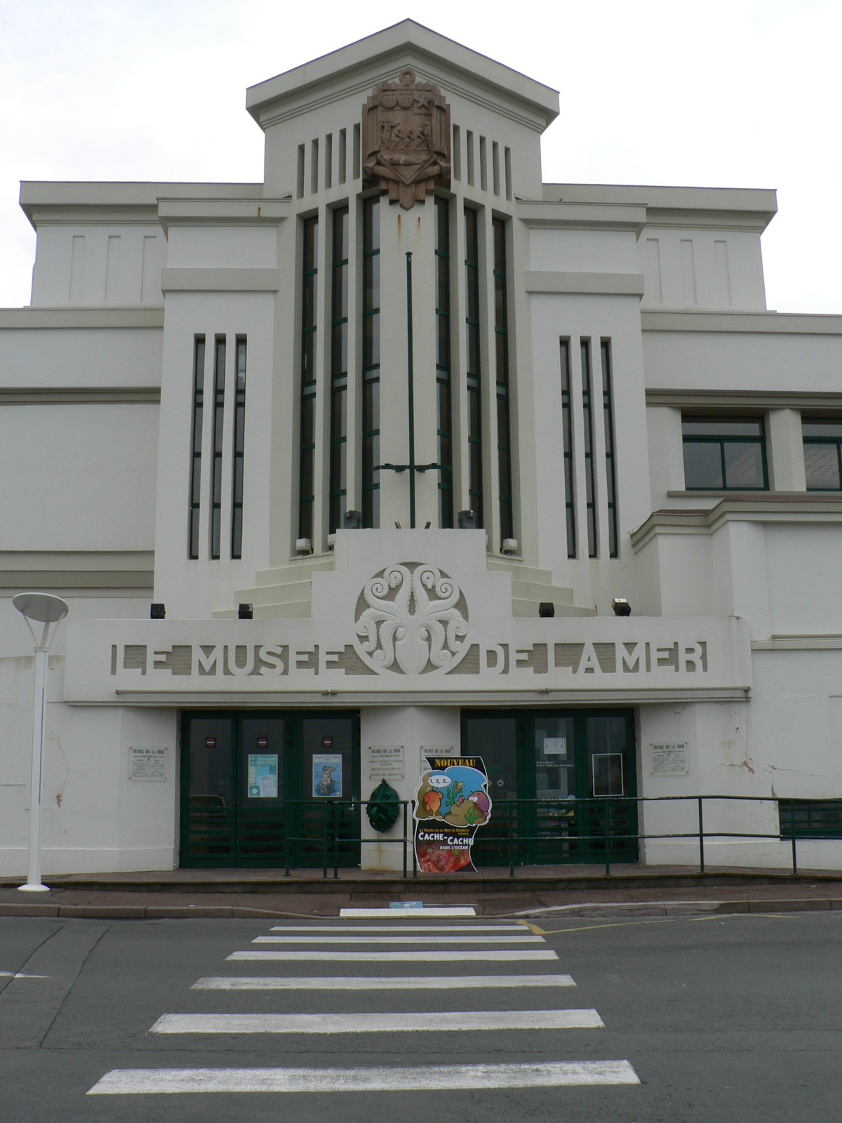 Biarritz